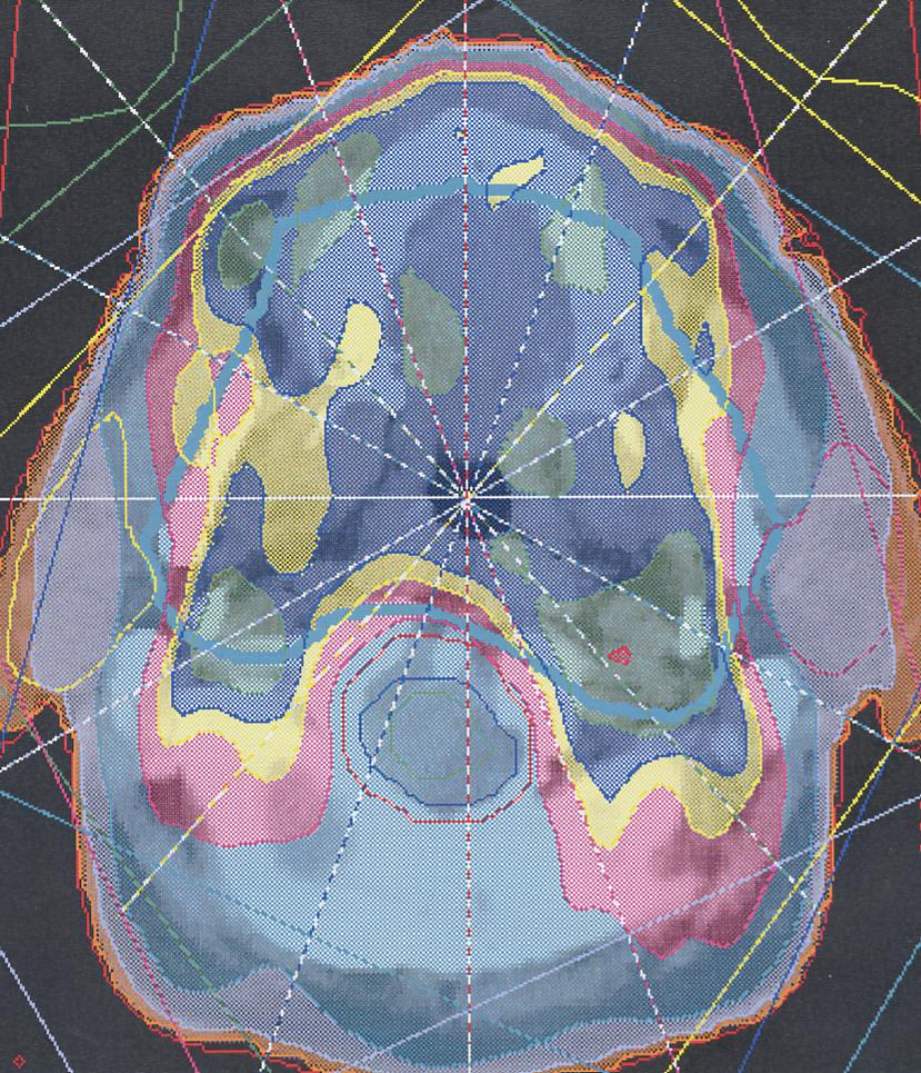 Rechnerplan einer IMRT